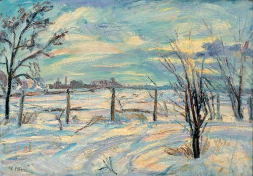 Landschaft bei Lichterfelde im Winter, Öl auf Leinwand; 66 x 95 cm; Collection: Stiftung Stadtmuseum Berlin